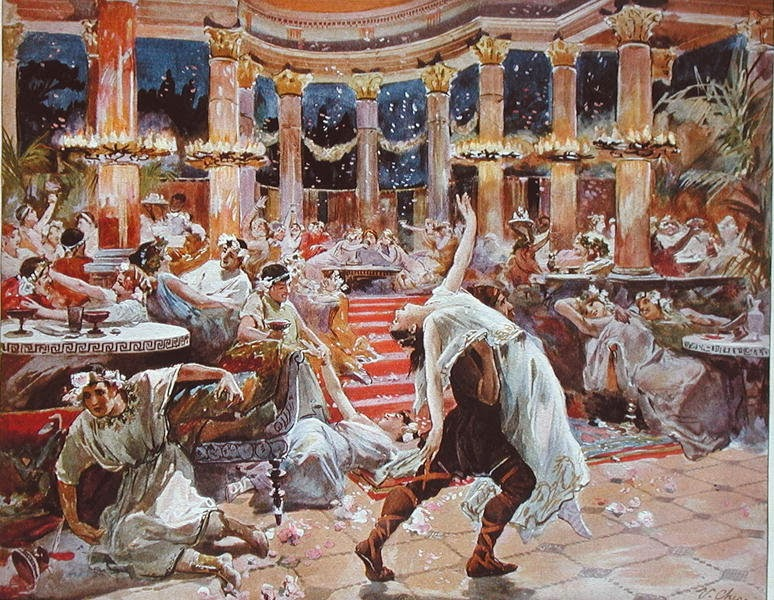 Ulpiano Checa y Sanz Title: A Banquet in Nero's palace, illustration from 'Quo Vadis', c.1910